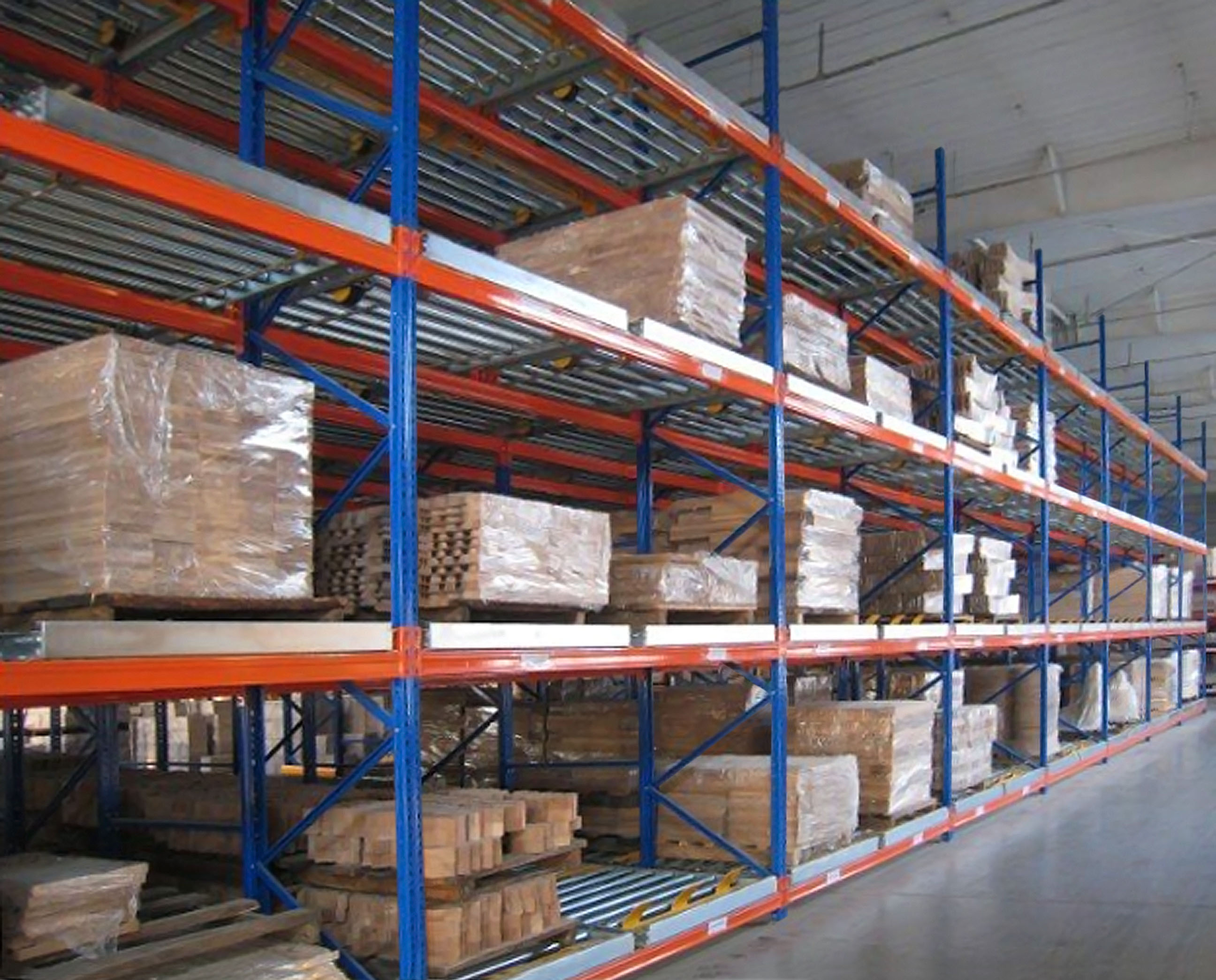 Фото гравитационной конструкции